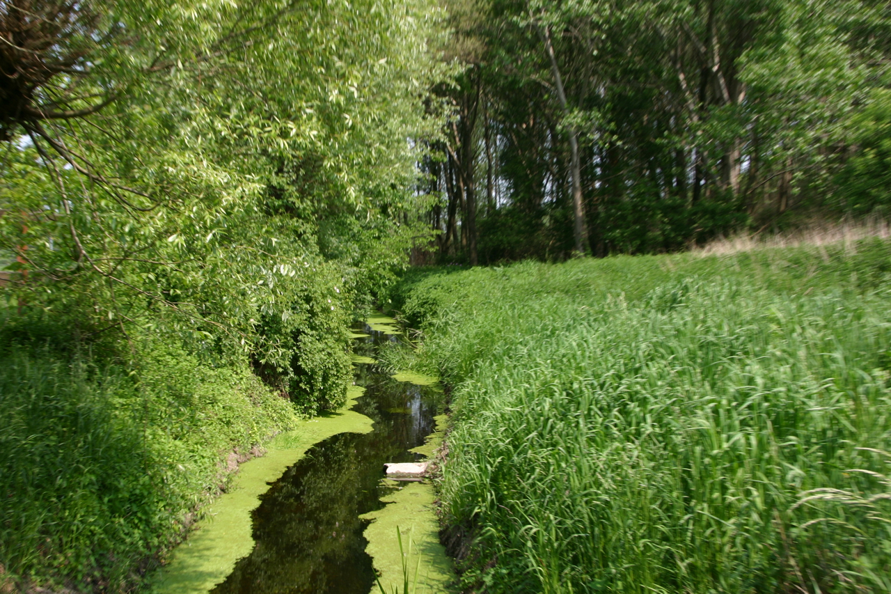 Die Fuhne bei Trebbichau an der Fuhne ist ein Ortsteil der Stadt Südliches Anhalt in Sachsen-Anhalt, Deutschland.